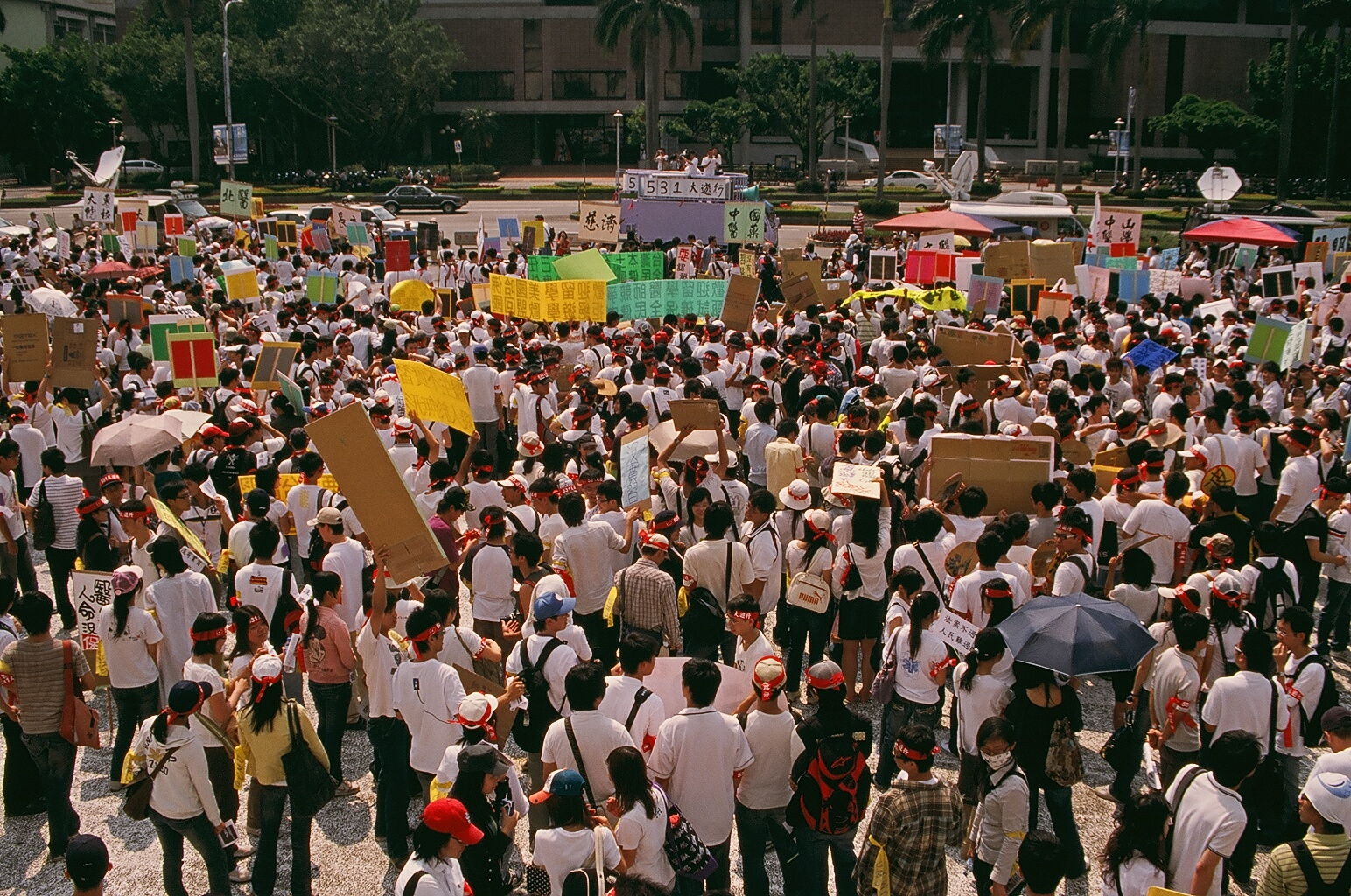 台灣醫學生遊行於中正紀念堂自由廣場集結，對面是國家圖書館總館。